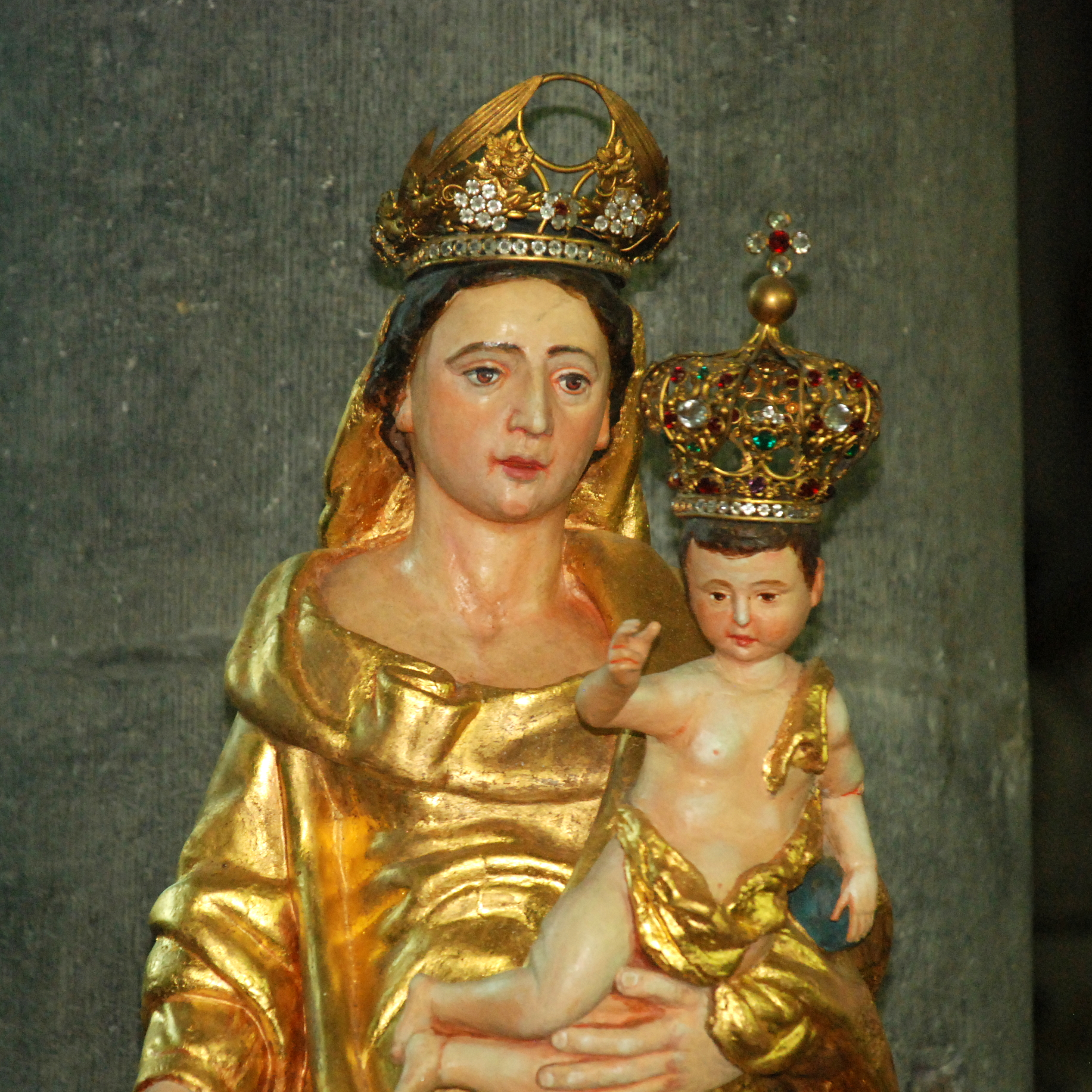 Belgique - Brabant wallon - Église de Court-Saint-Étienne